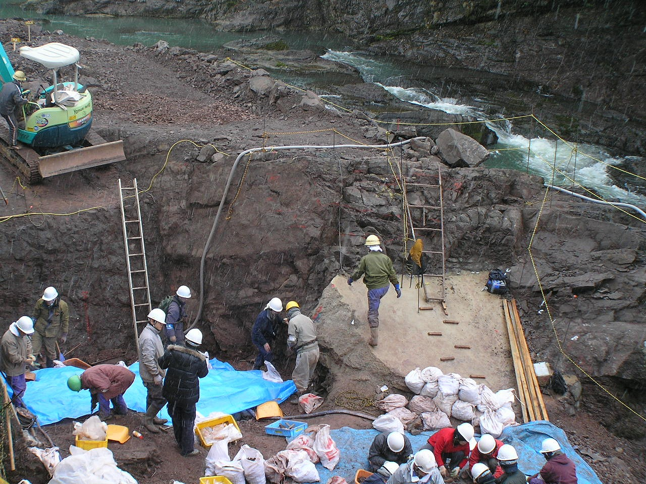 発掘現場地層断面・丹波竜の発見された現場の第二次発掘調査